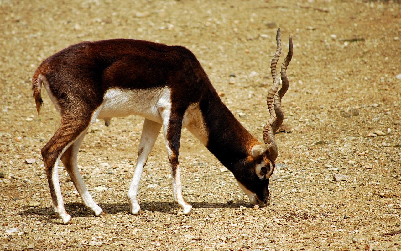 Male Blackbuck (Antilope cervicapra)